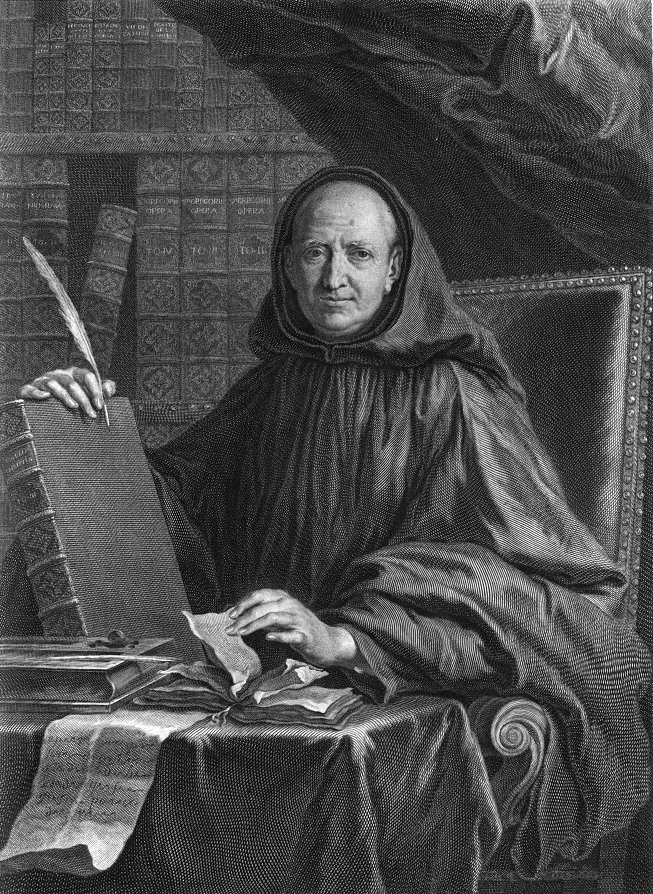 Retrato de Denis de Sainte-Marthe (1650-1725), superior general de la congregación de San Mauro, teólogo e historiador francés.